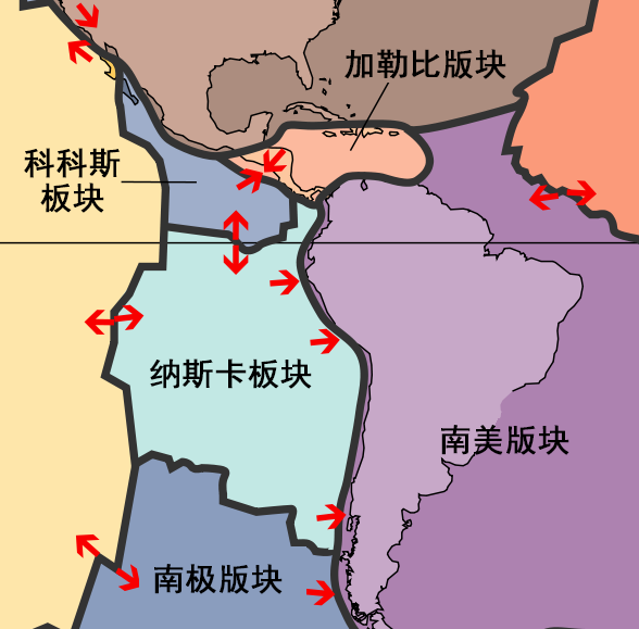 将File:South American plates.png作中文翻译。